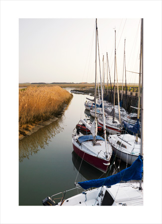 Bateaux de plaisance au Port de la Madelon, Waben (62),France.